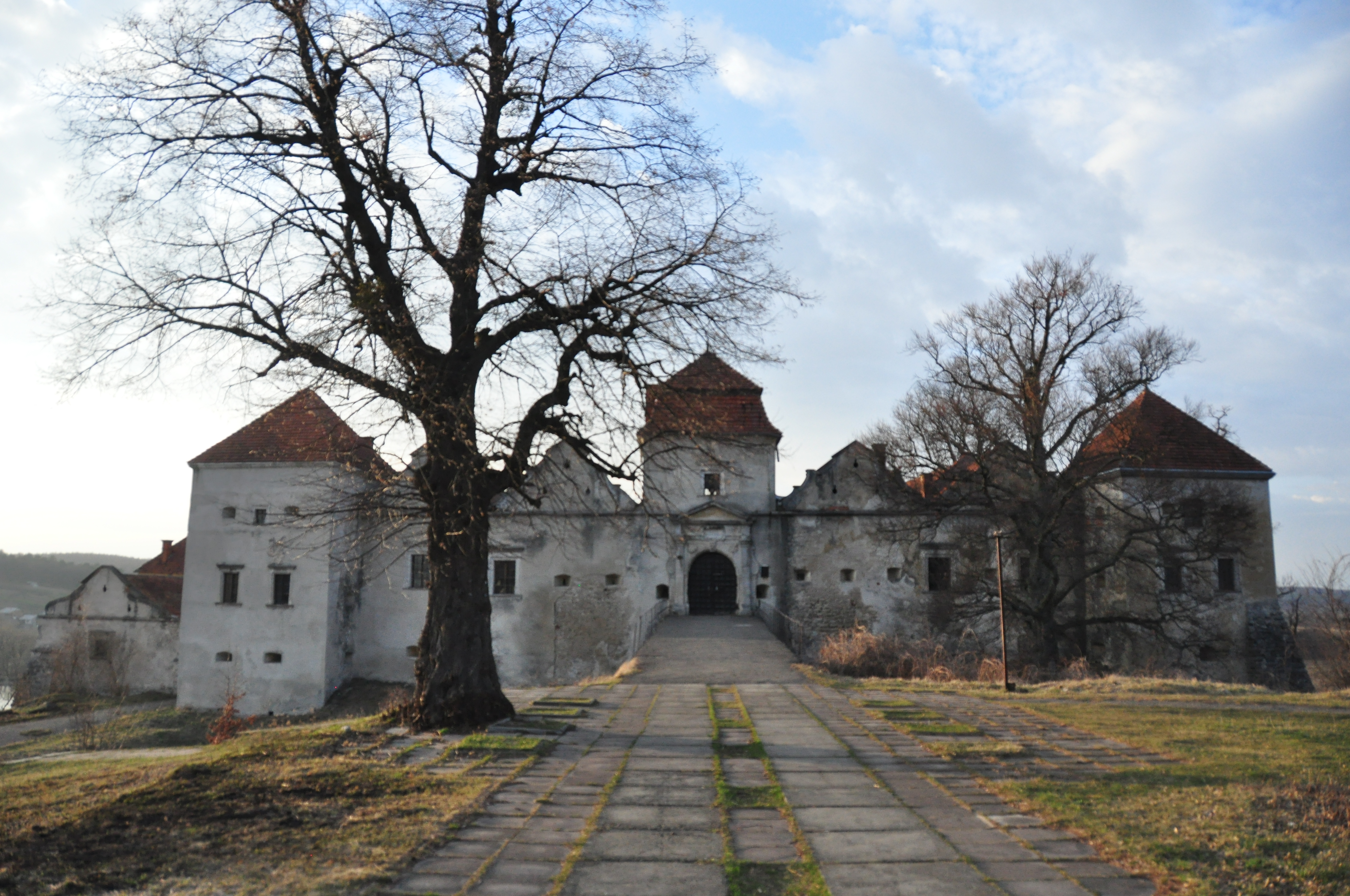 Замок у Свіржі Перемишлянського р-ну Львівської обл. Вхід до замку.